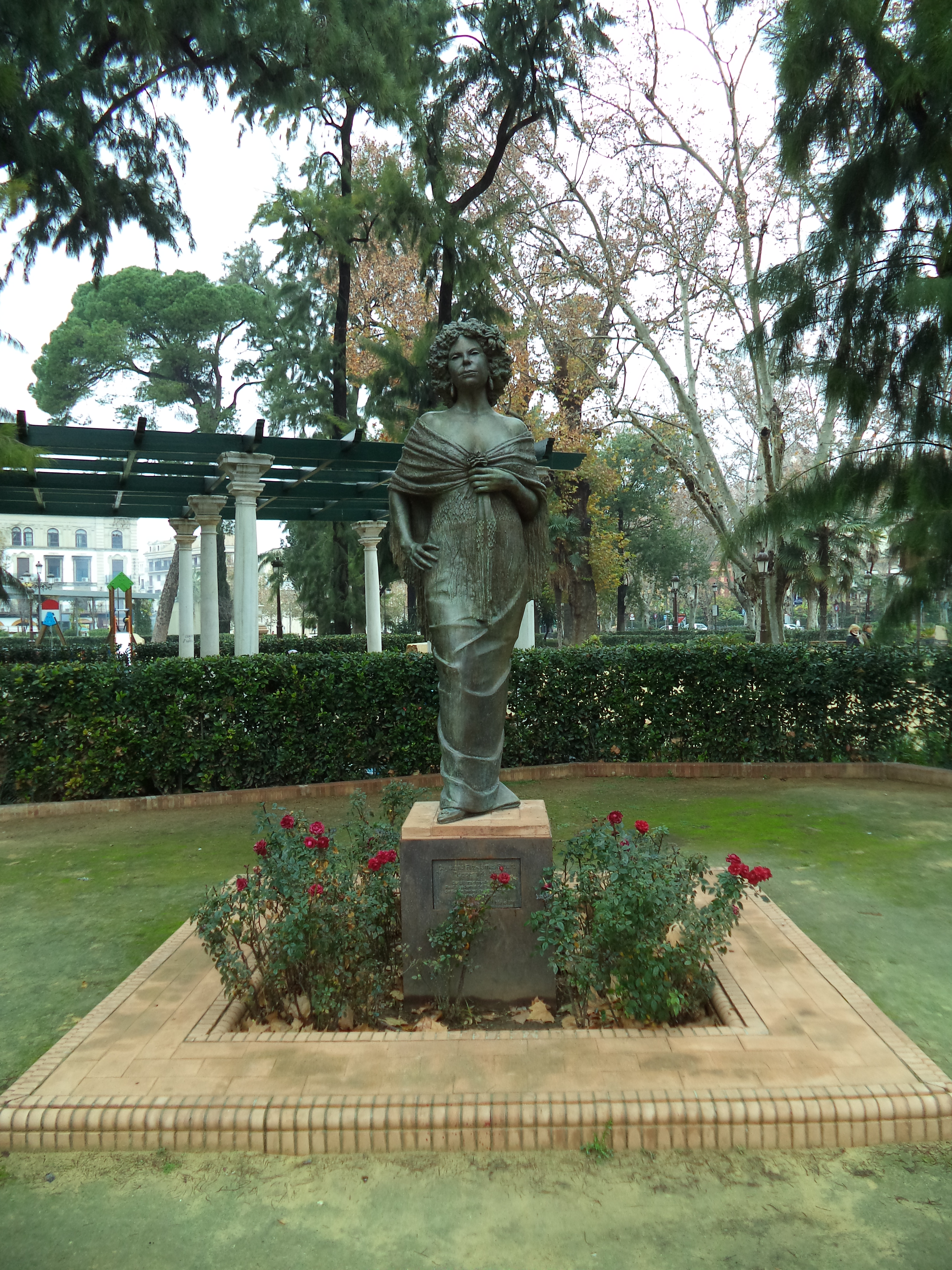 Estatua de la Duquesa de Alba en los Jardines de Cristina, Sevilla. Fue inaugurada el 25 de mayo de 2011.